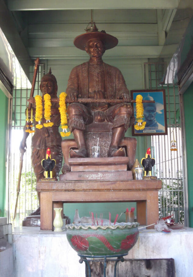 วัดไทร